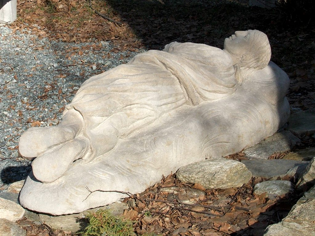 Góra Oliwna w Bolesławowie (Dolny Śląsk, Polska) – apostoł